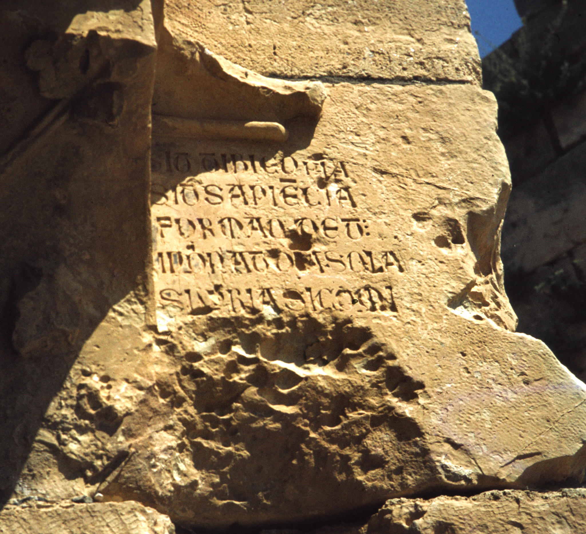 Inscription latine sur le mur de la cours au Krak des chevaliers.